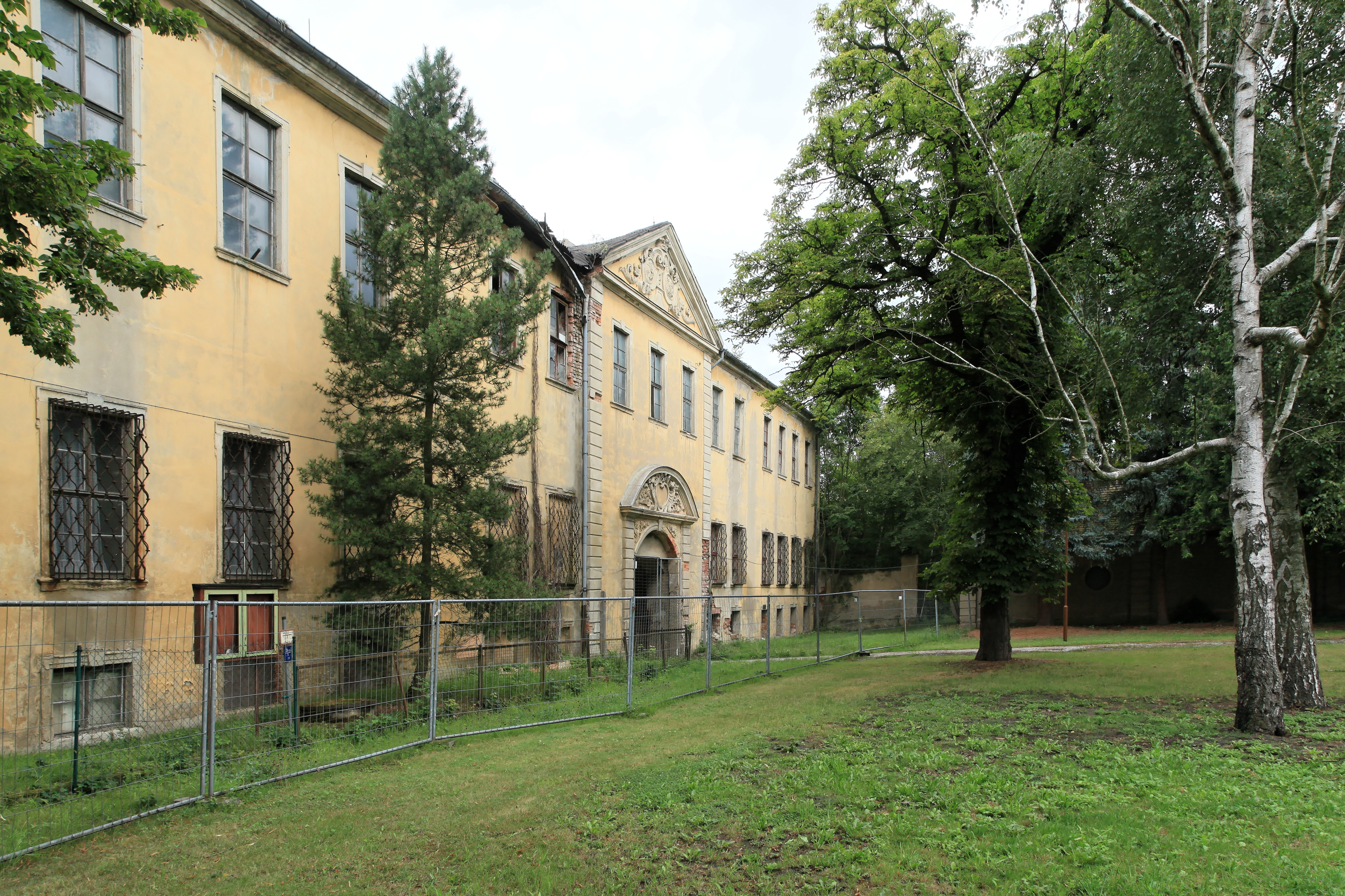 Schloss Schönwölkau, Kirchplatz in Wölkau, Schönwölkau